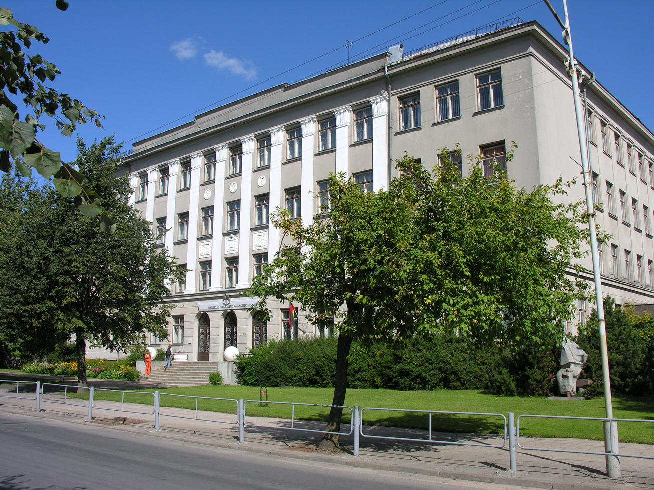 Mažeikių Merkelio Račkausko gimnazija Foto: Algirdas, 2005 m. rugsėjo 2 d.